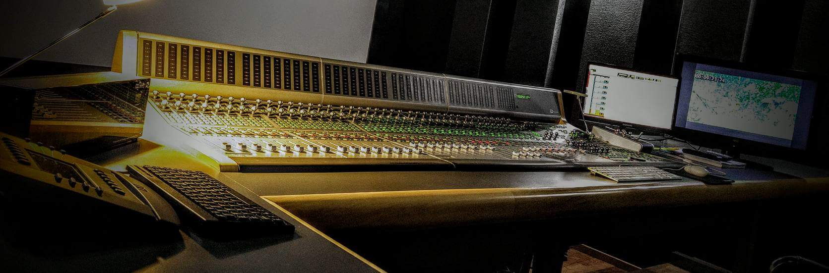 Os materiais mais usados